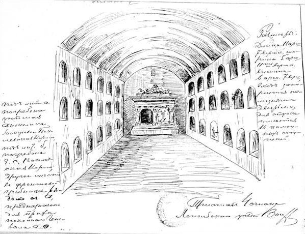 Беларуская (тарашкевіца): Быкаўшчына (Bykaŭščyna). Касьцёл